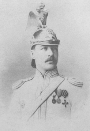 Петр Михайлович Катков (1858—1895), поручик Кавалергардского полка, сын издателя «Московских ведомостей» М. Н. Каткова.